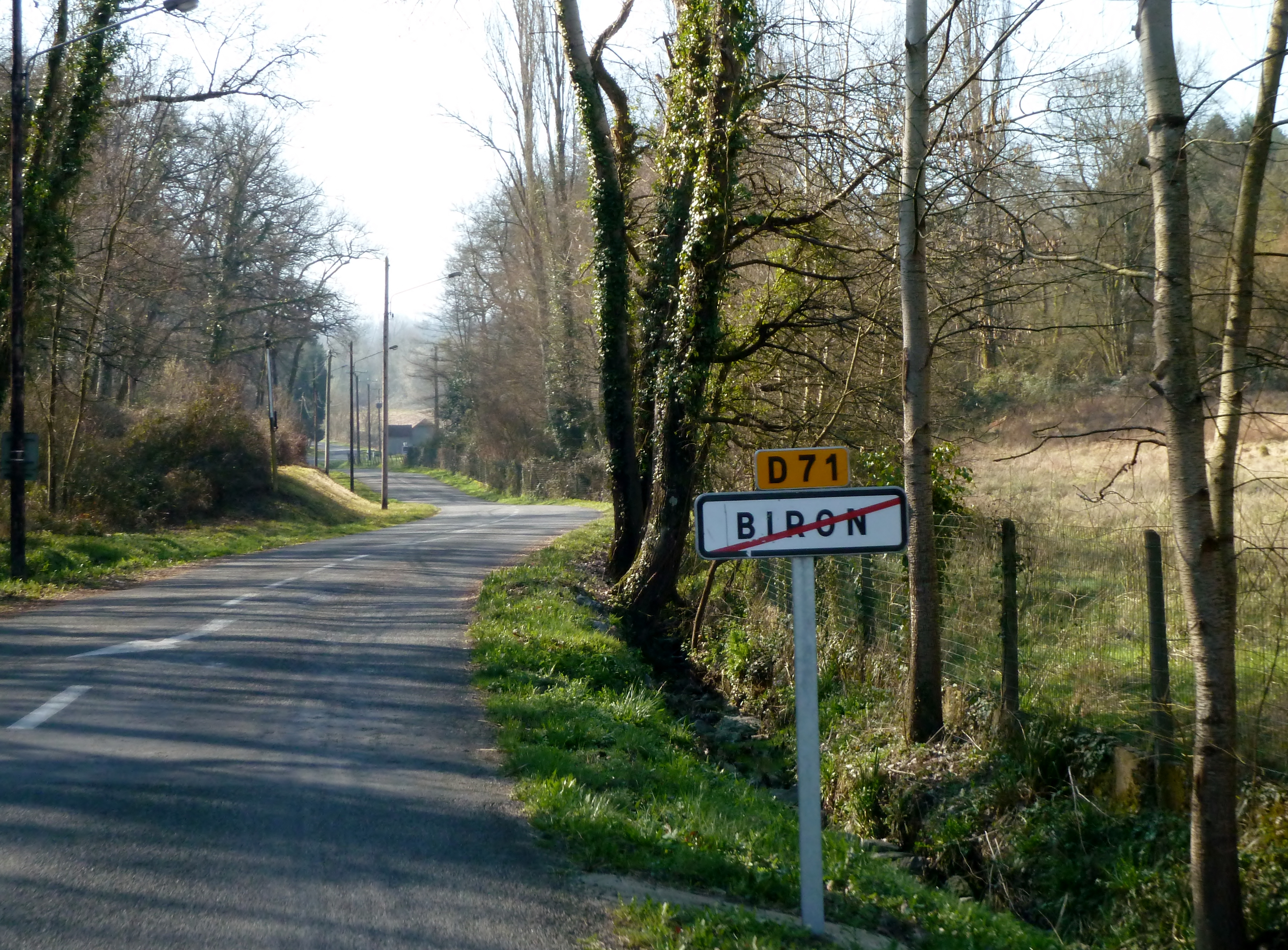 Sortie de Biron (Pyrénées-Atlantiques)